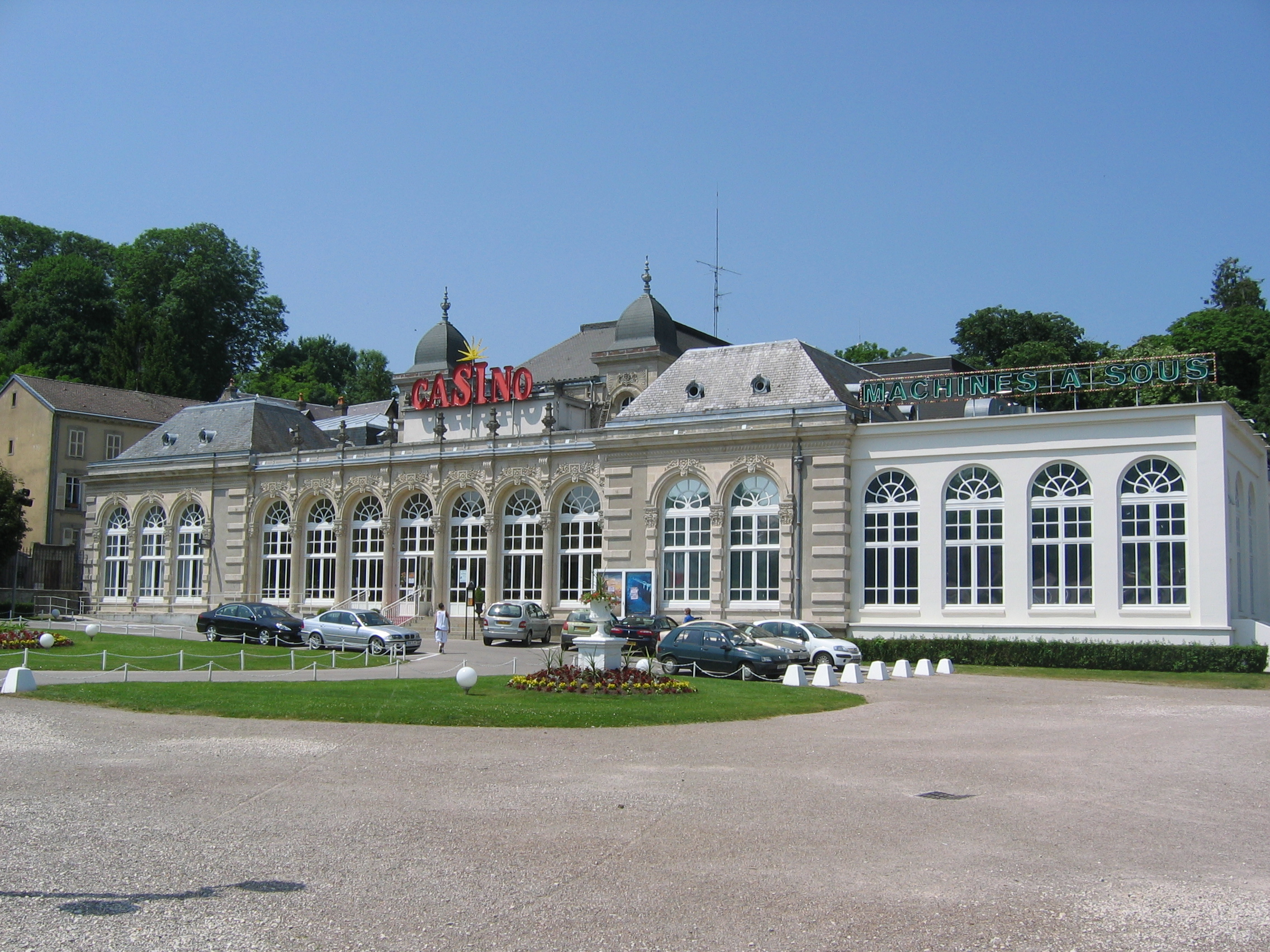 Casino de Contrexéville, Vosges, Lorraine, France